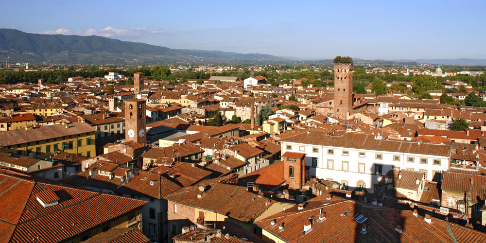 Panorama di Lucca dalla Torre dell'orologio, vista verso nord-est